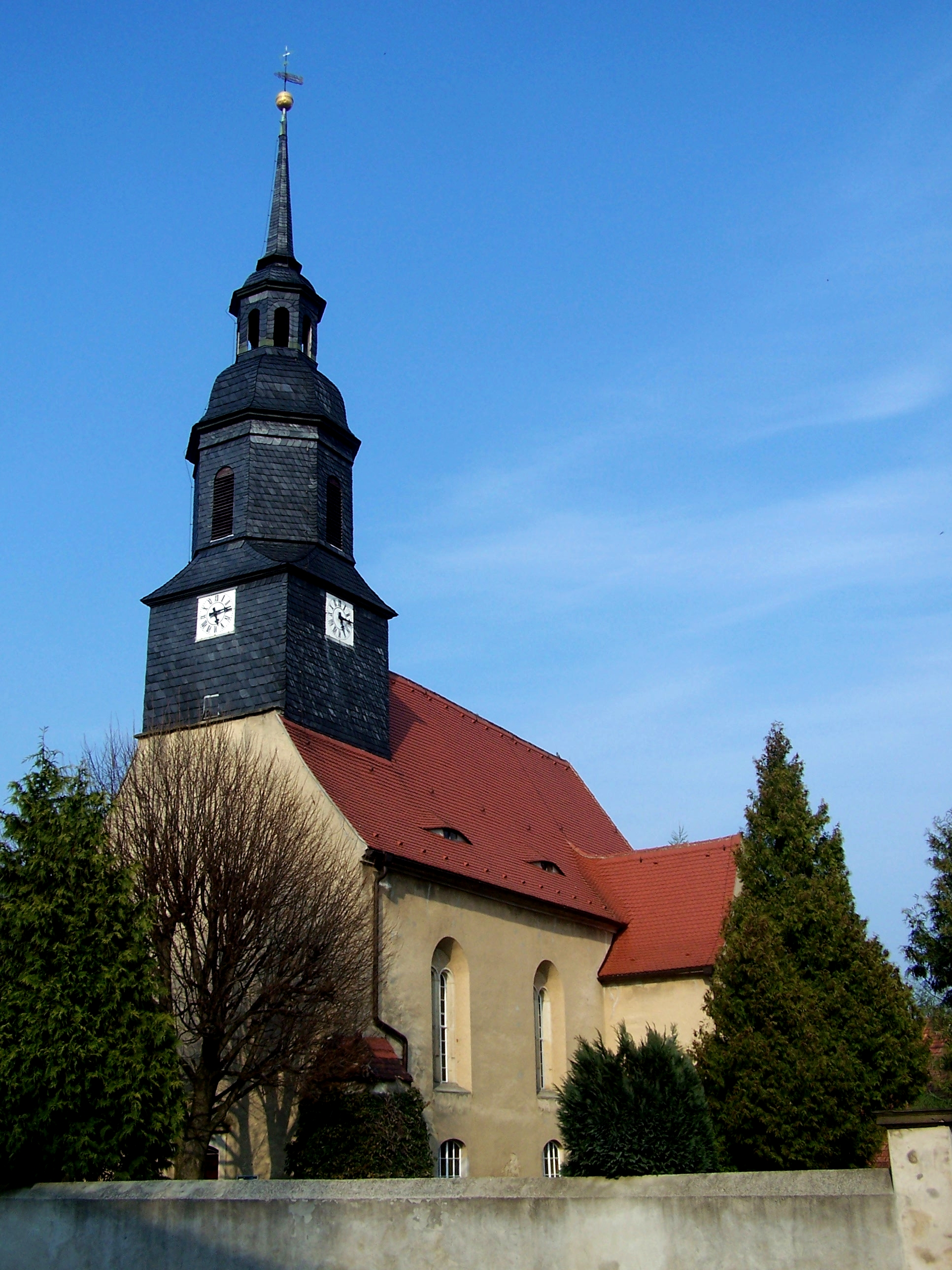 Kirche von Rödern, Gemeinde Ebersbach, Landkreis Meißen